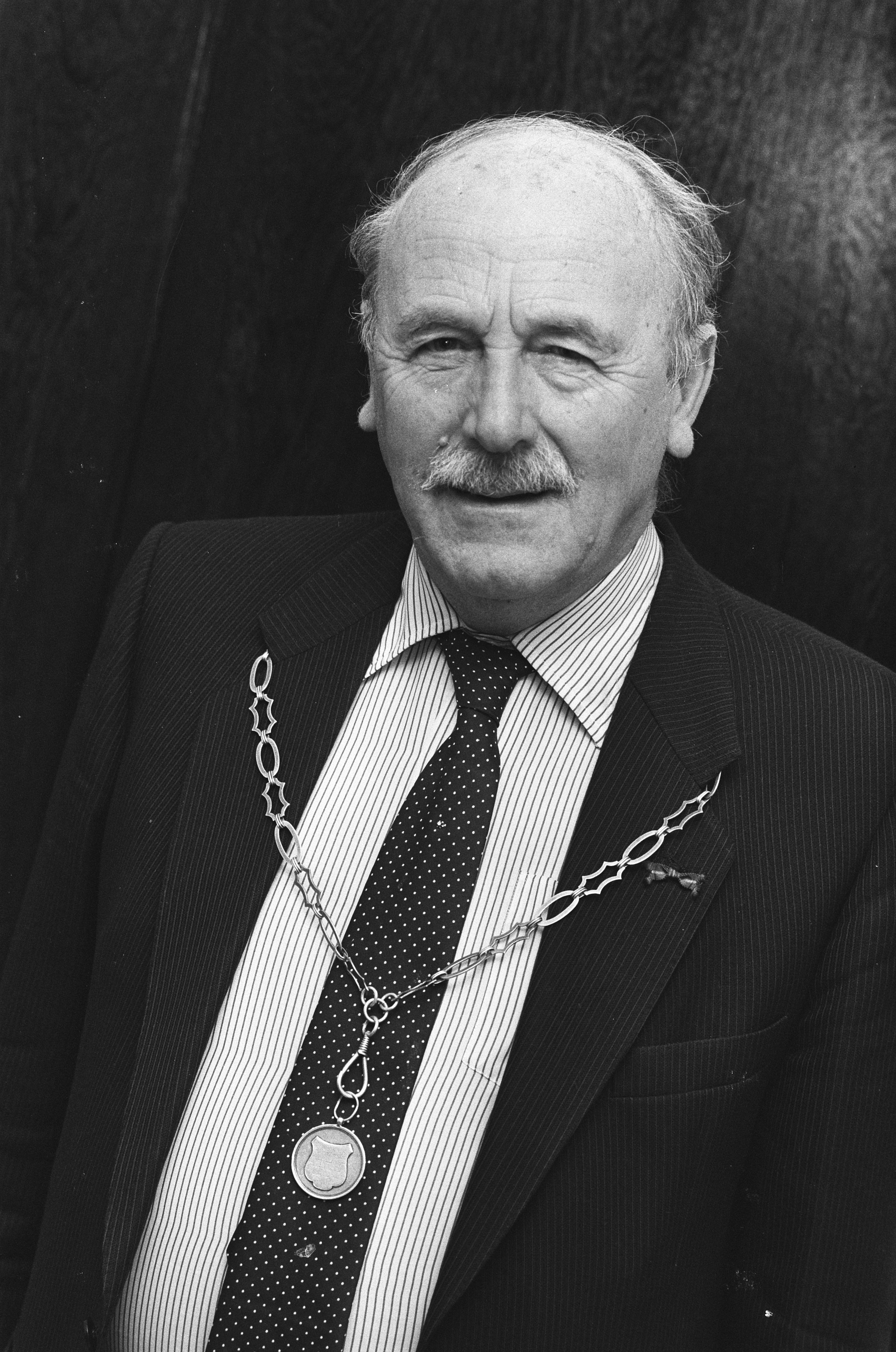 Collectie / Archief : Fotocollectie Anefo Reportage / Serie : M.W. (Maarten) Schakel 40 jaar burgemeester Beschrijving : M.W. (Maarten) Schakel ; 40 jaar burgemeester van Noordeloos, Hoornaar en Hoogblokland Datum : 24 december 1985 Trefwoorden : burgemeesters, jubilea, portretten Persoonsnaam : Schakel, Maarten Fotograaf : [onbekend] Auteursrechthebbende : Nationaal Archief Materiaalsoort : Negatief (zwart/wit) Nummer archiefinventaris : bekijk toegang 2.24.01.05 Bestanddeelnummer : 933-5229